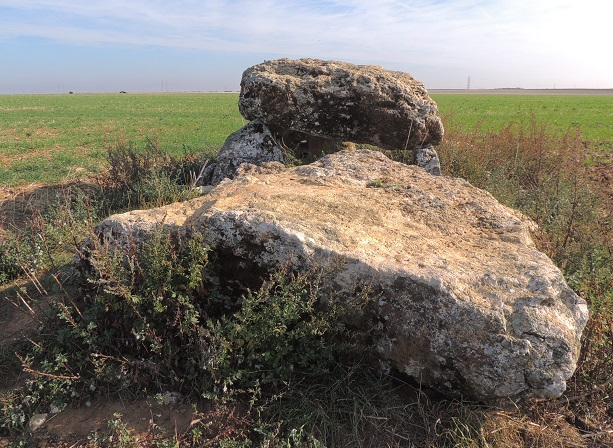 Dolmen de la pierre levée côté Sud avec une grande dalle à terre au premier plan (sépulture?) et le dolmen ouvert à droite, derrière, sur des petits orthostats avec sa table épaisse et ovoïde. Herbes sauvages au premier plan et champs de très jeunes pousses vert derrière et à l'horizon